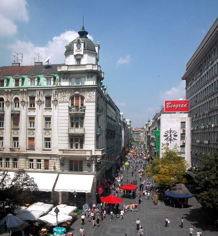 yugo sılavya belgrad by ismail soytekinoğlu